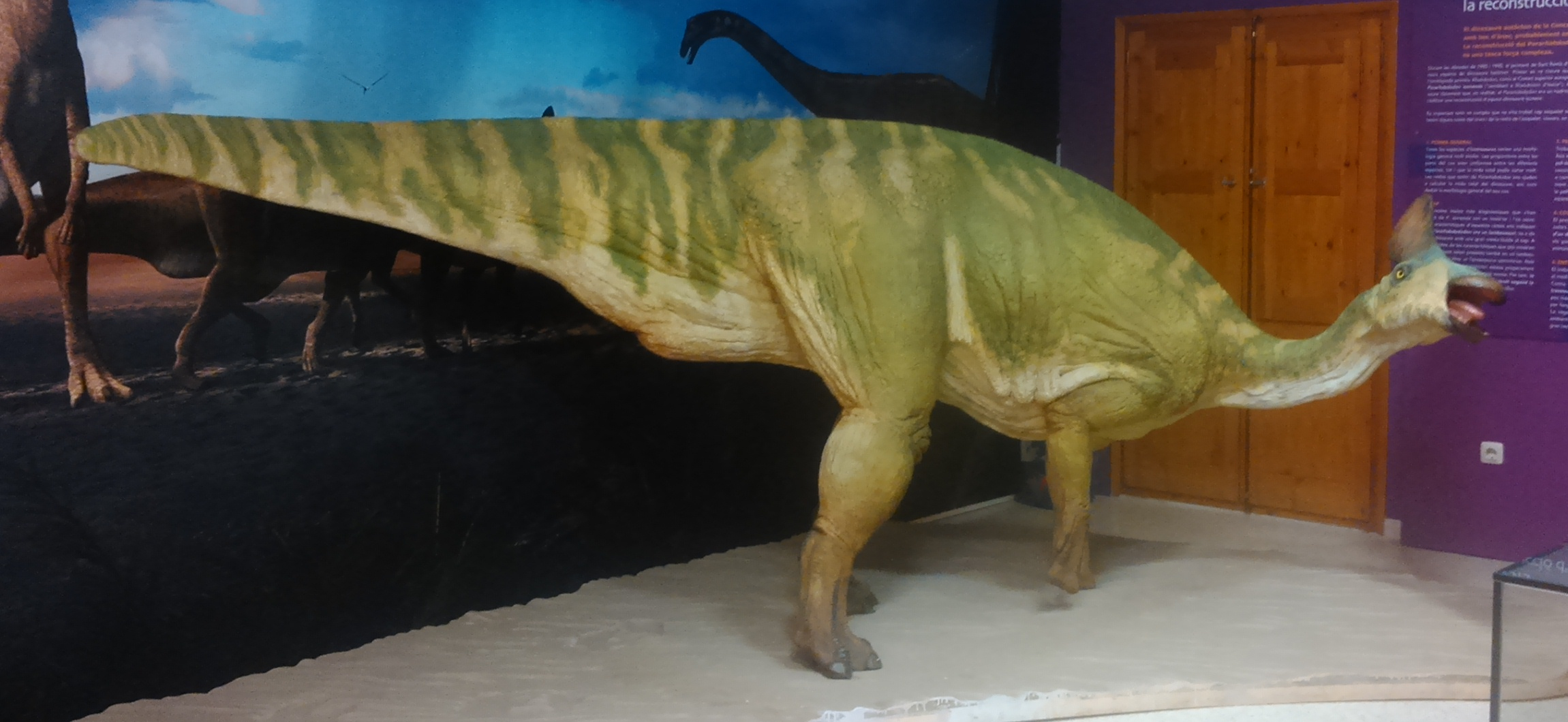 Isona Pararhabdodon